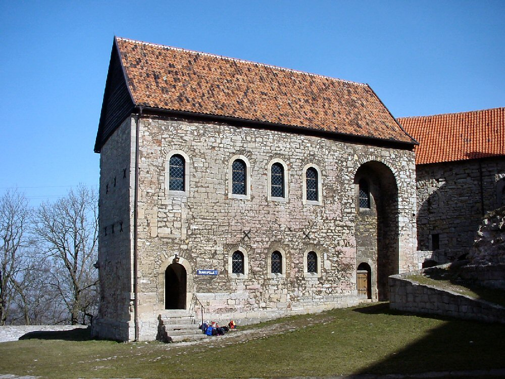 Lohra Burg Doppelkapelle, eigenes Foto von 2004, Public Domain